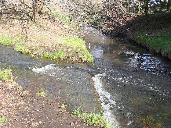 Lietzengraben, Mündung in die Panke, am NSG Karower Teiche, Berlin